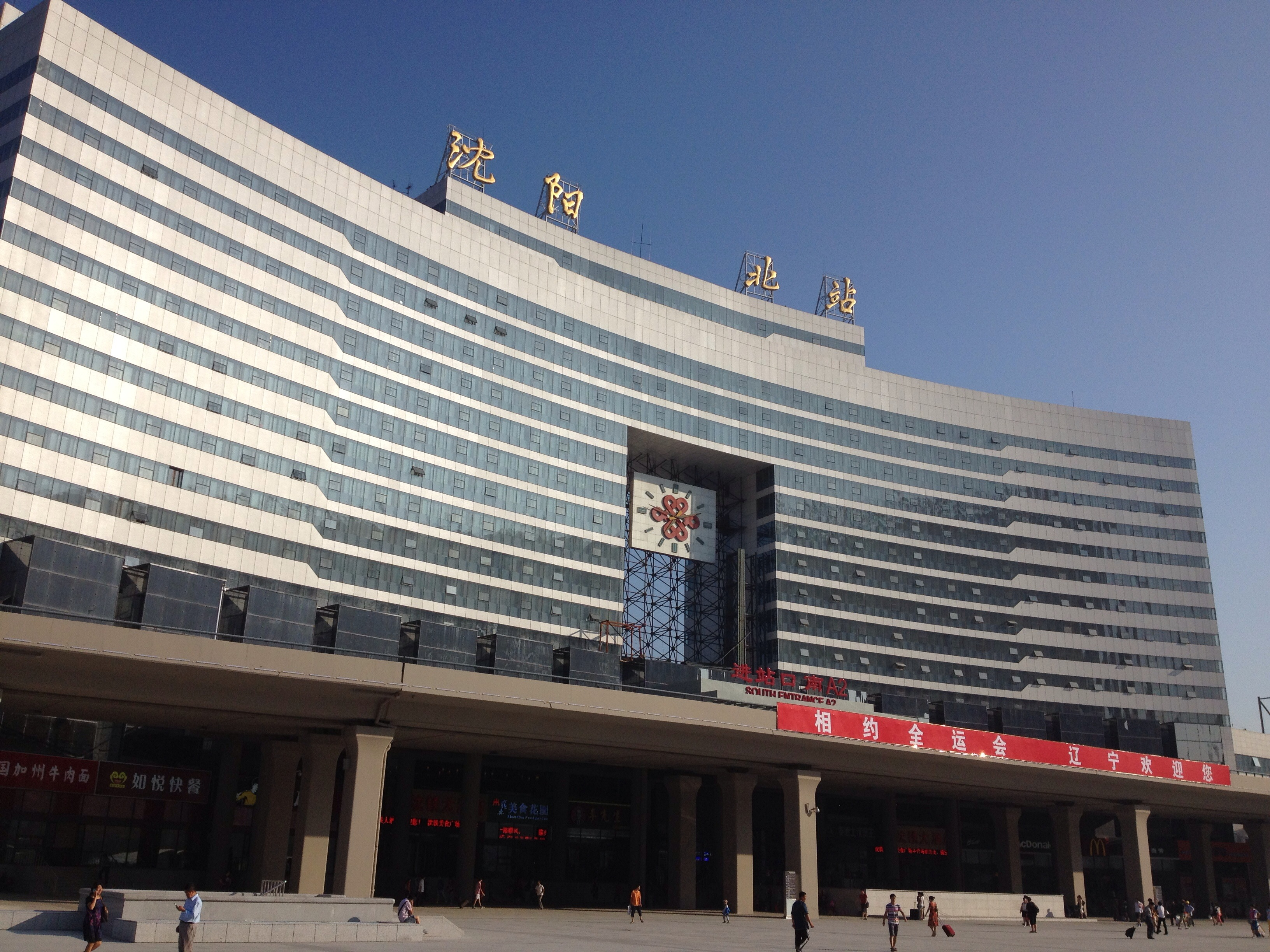 沈阳北站主站房